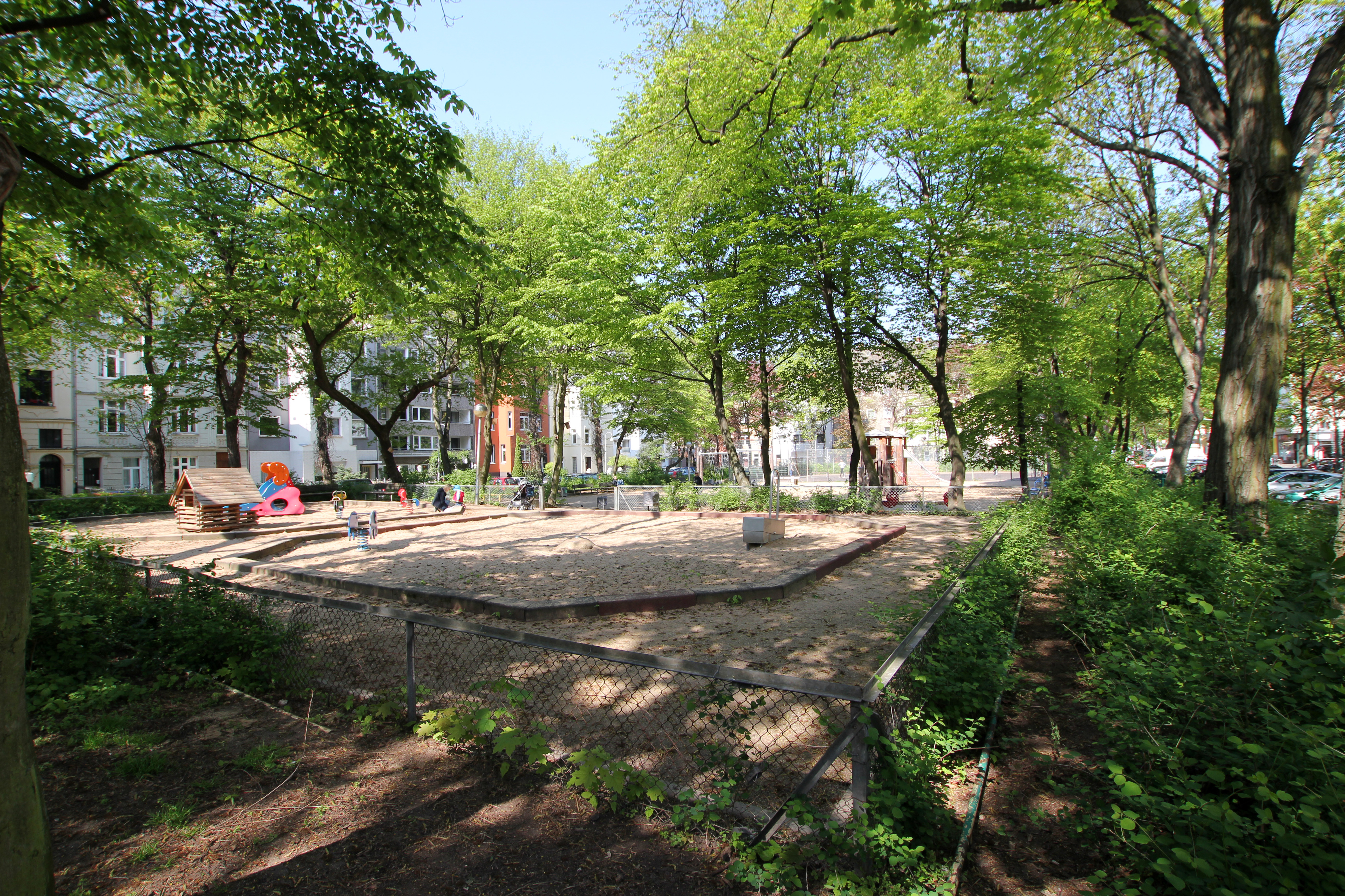 Köln-Sülz, Grünanlage und Kinderspielplatz De-Noel-Platz